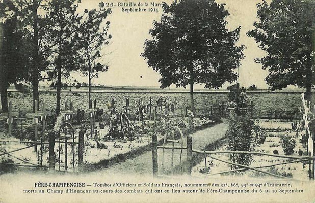 Sépultures d'officiers et de soldat à Frère-Champenoise des 32° RI, 66° RI, 93° RI 94° RI tombé lors de la bataille de la Marne en 1914